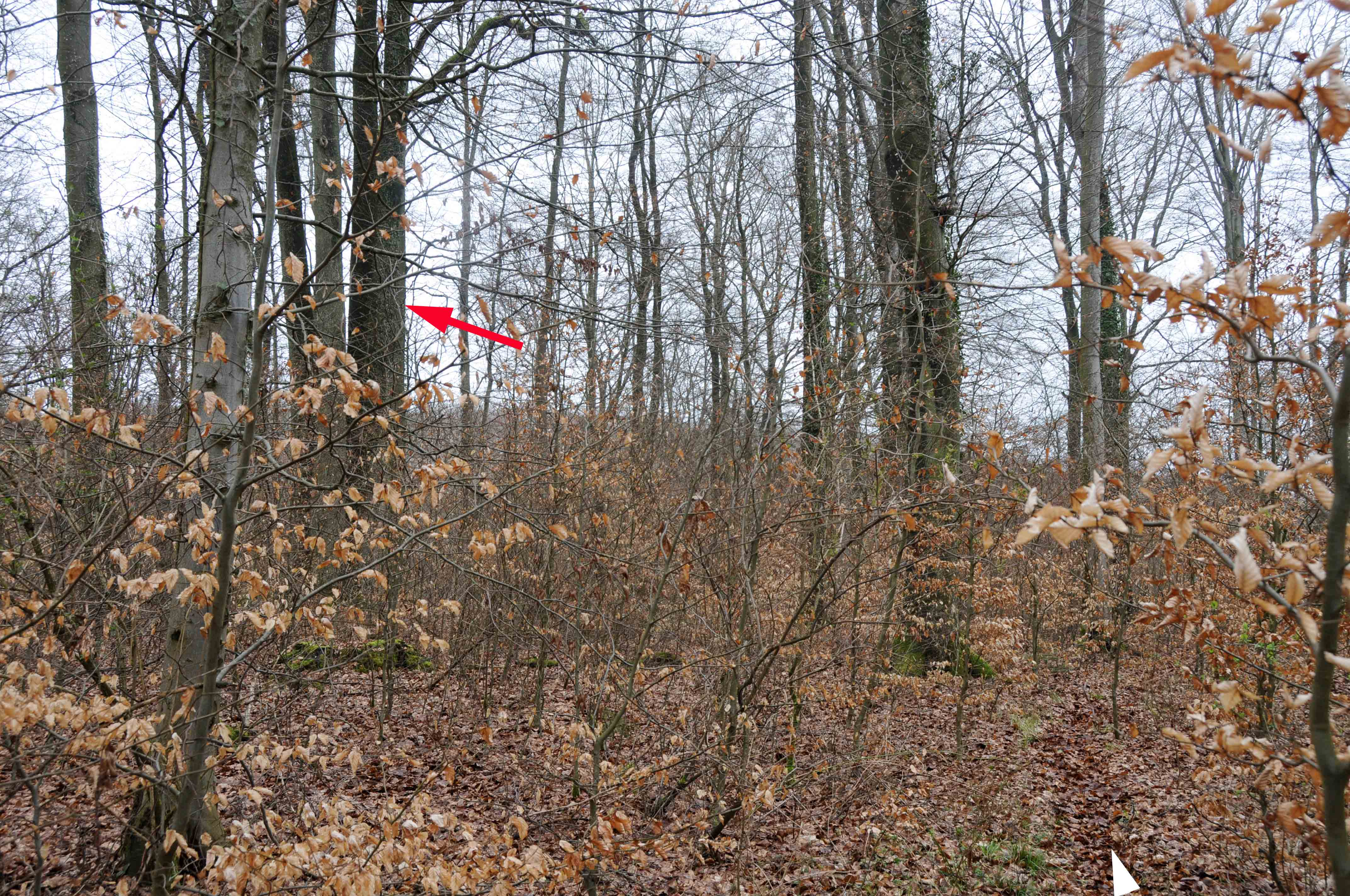 Le chêne pédonculé remarquable de Kahler (Luxembourg)